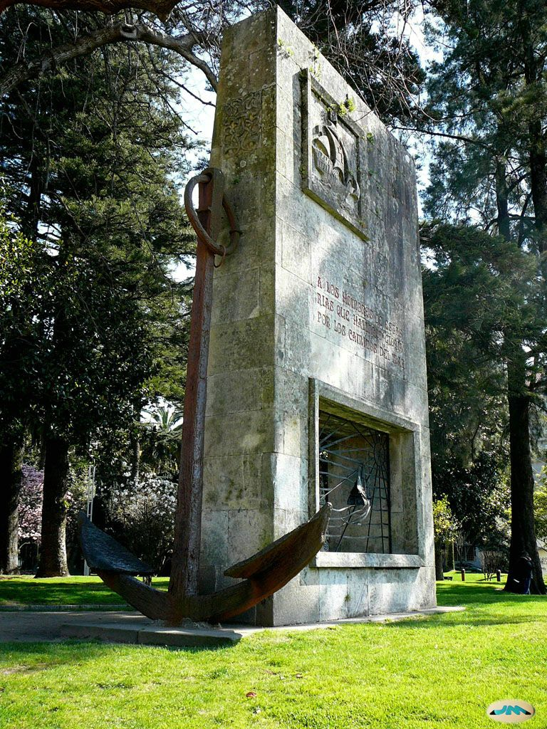 Monumento aos homes do mar. Pontevedra. As Palmeiras